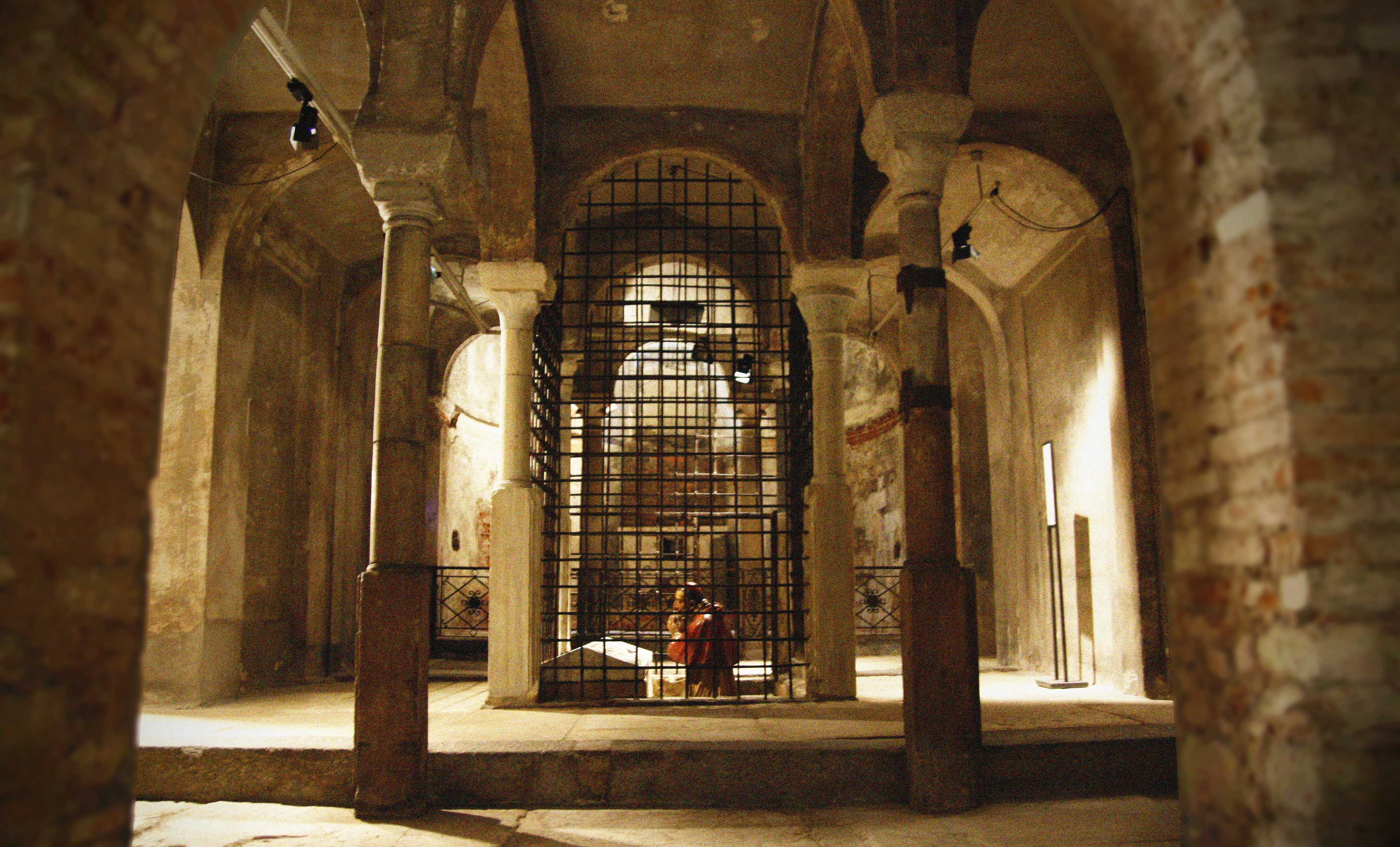 Cripta della chiesa del Santo Sepolcro